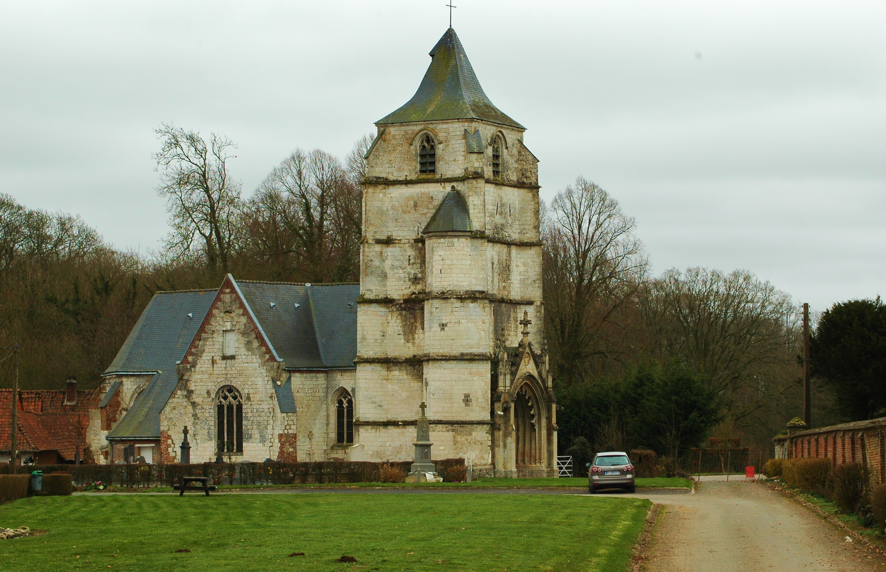 Eglise de TRAMECOURT, Pas de Calais, France